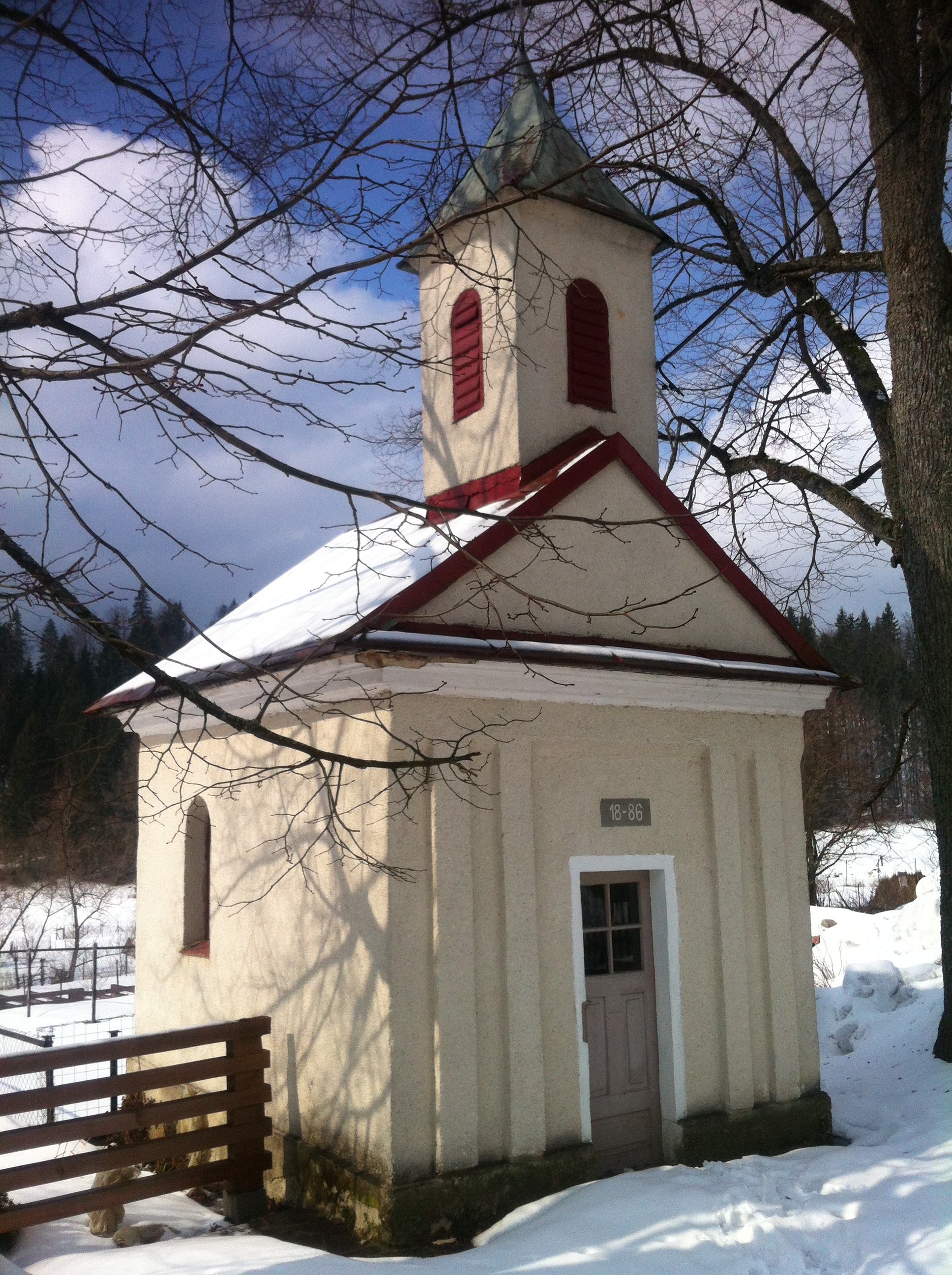 "Kaplonka", Bully, zima 2015